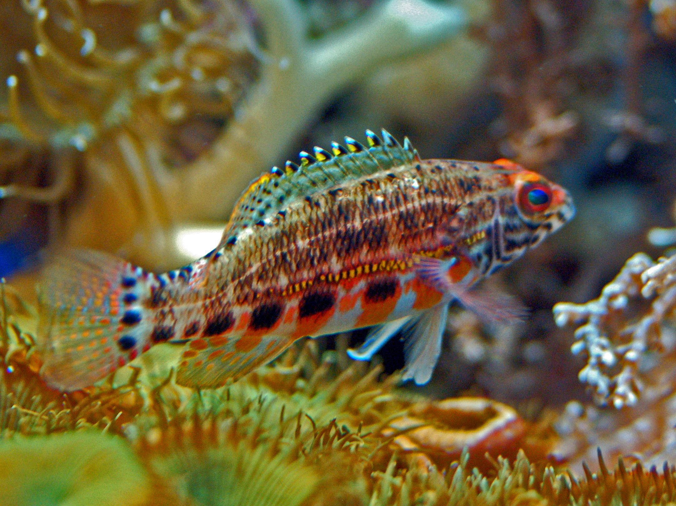 Serranus baldwini at Monaco Aquarium